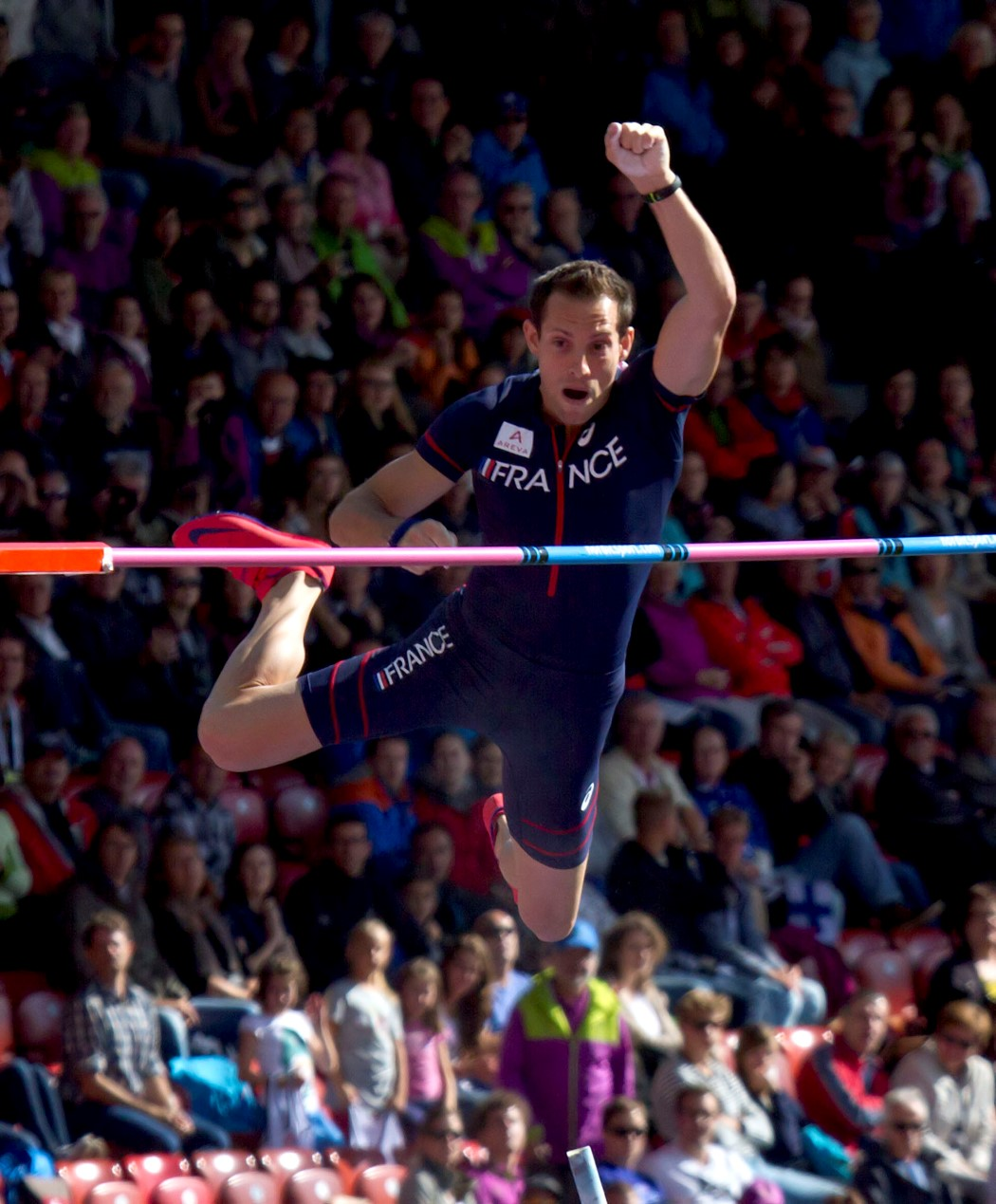 990368 lavillenie over 5m80